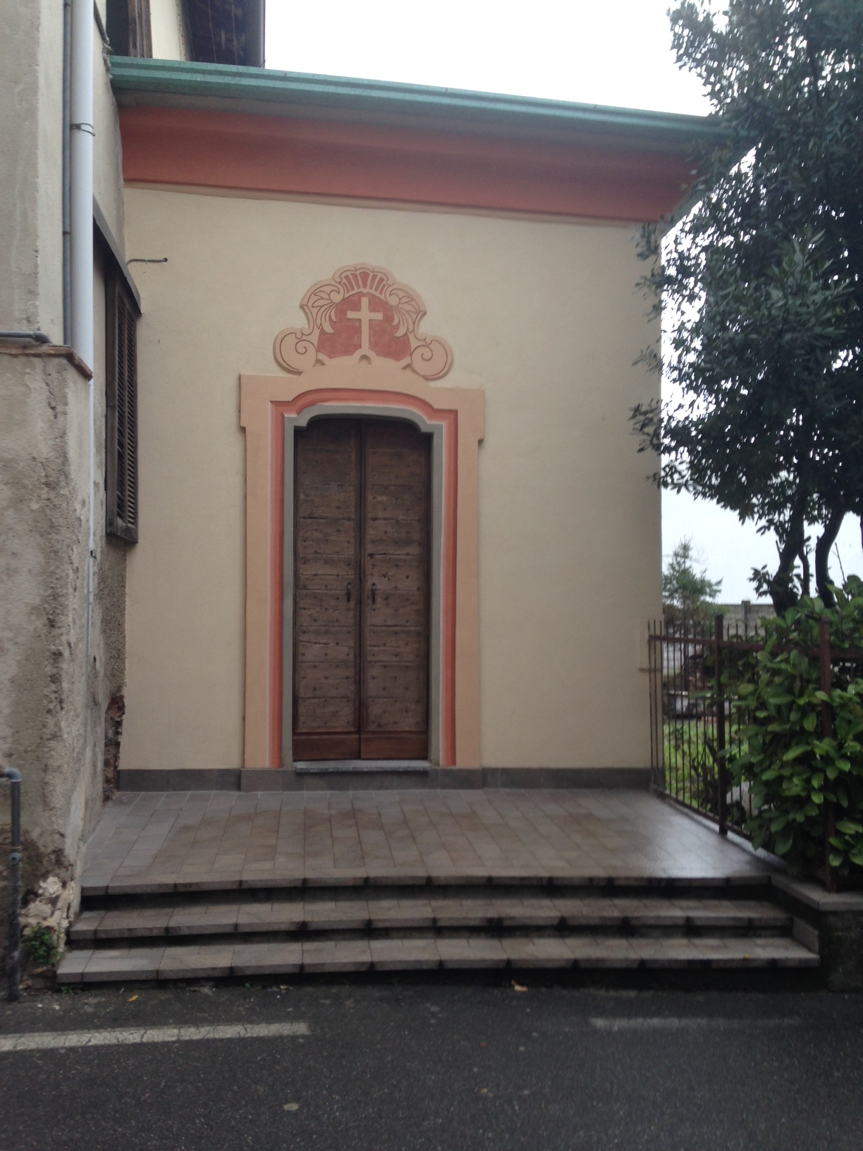 La facciata dell'Oratorio San Salvatore di Roncello